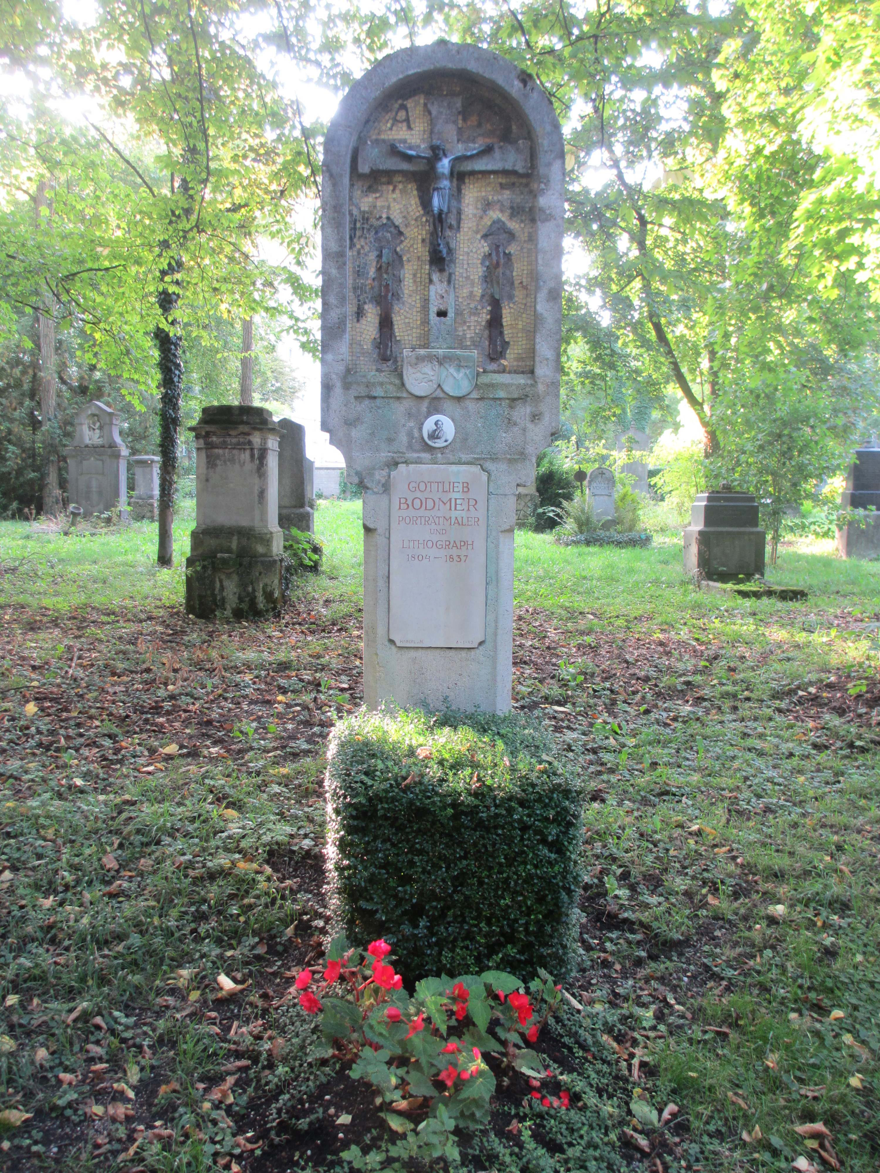 Grab-Gottlieb-Bodmer-Alter-Suedl-Friedhof-Muenchen